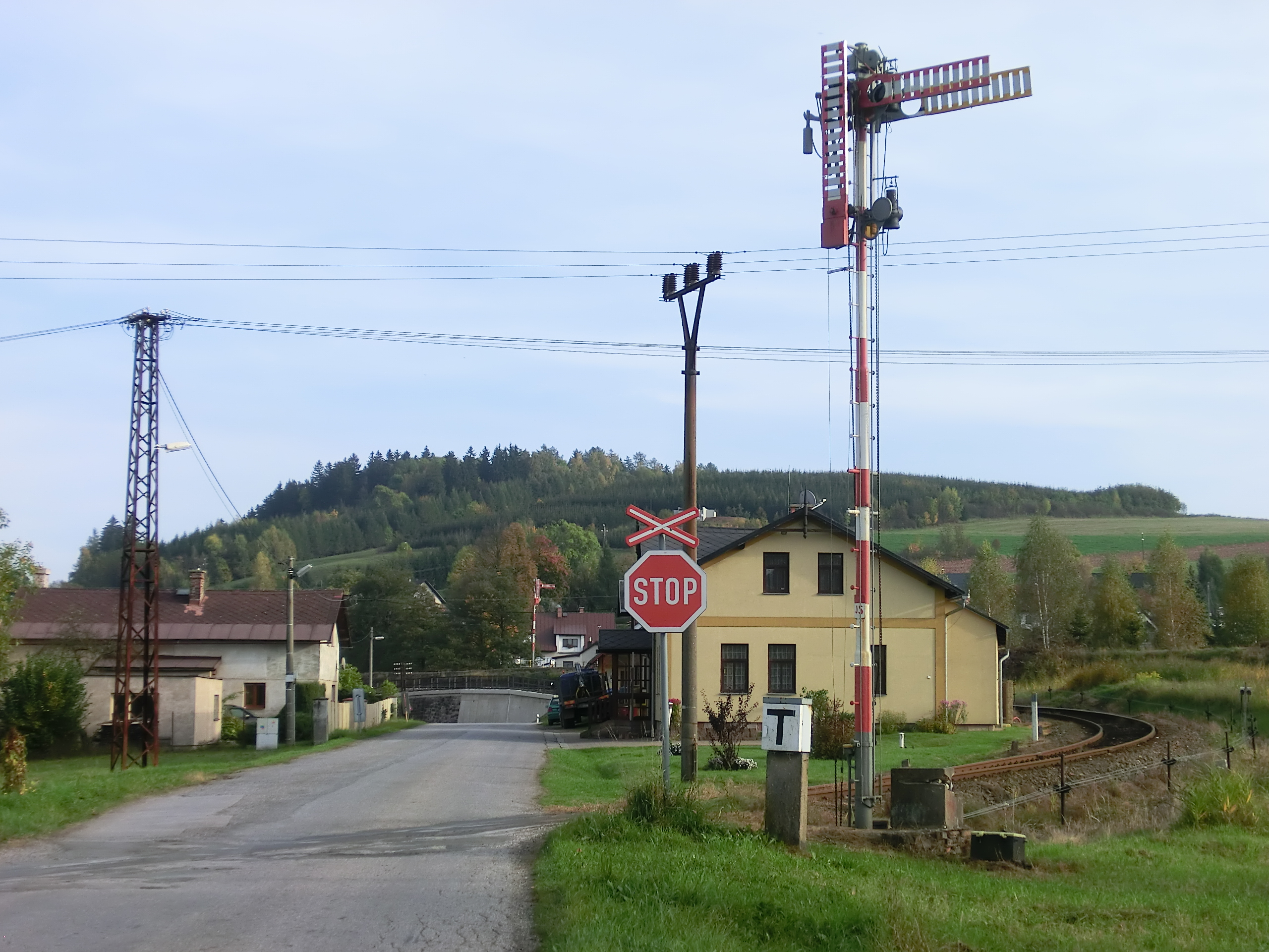 Klesající oblouk trati 042 ze zhlaví martinického nádraží směrem na Jilemnici, s vjezdovým návěstidlem. V budově mezi silnicí a železicí sídlí OÚ Martinice a pobočka České pošty. V pozadí jasně viditelný násep společného úseku trati 042 podél trati 040 ze Staré Paky a Chlumce nad Cidlinou.